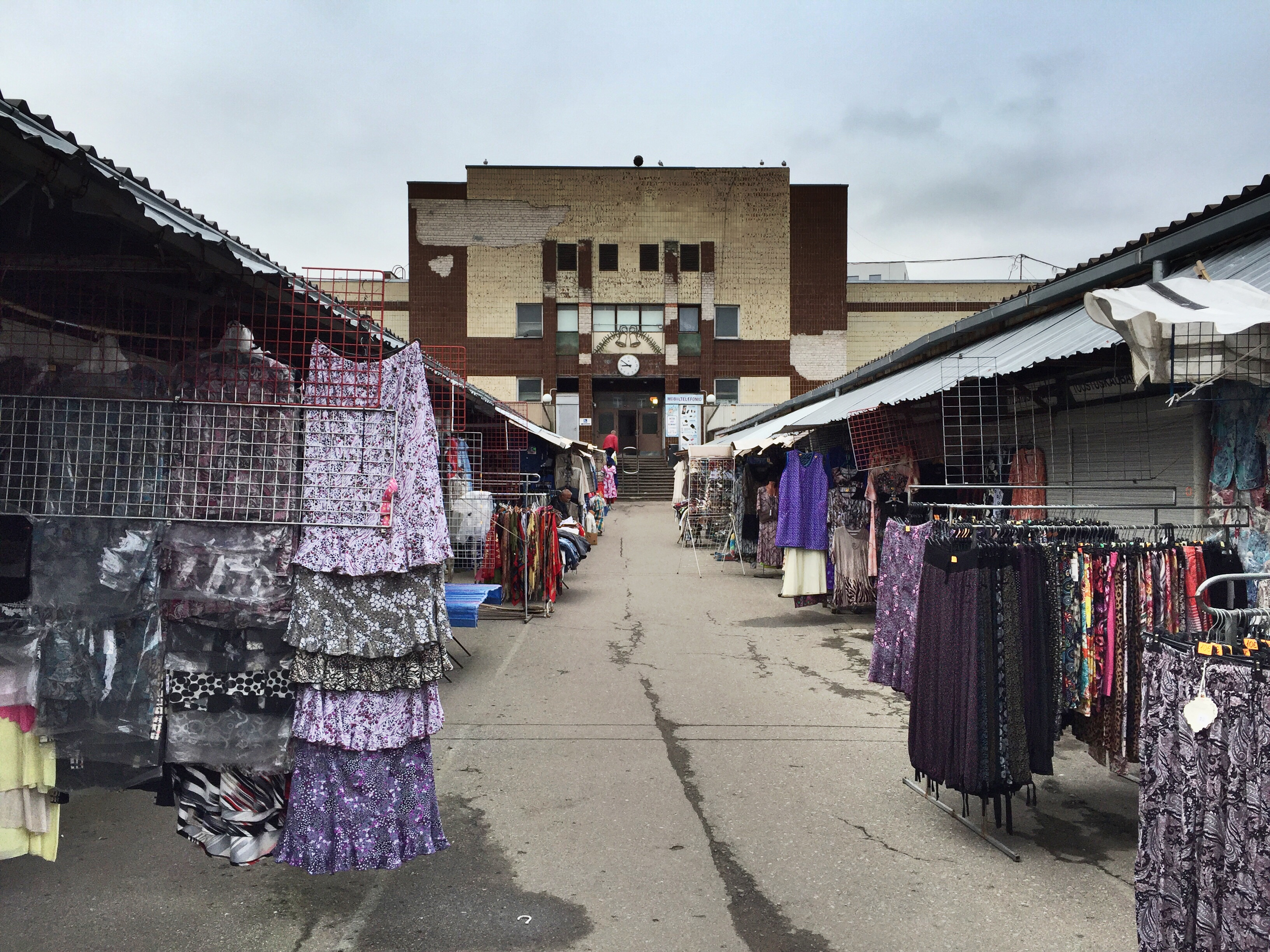 Central Market (Keskturg) in Tallinn, Estonia.